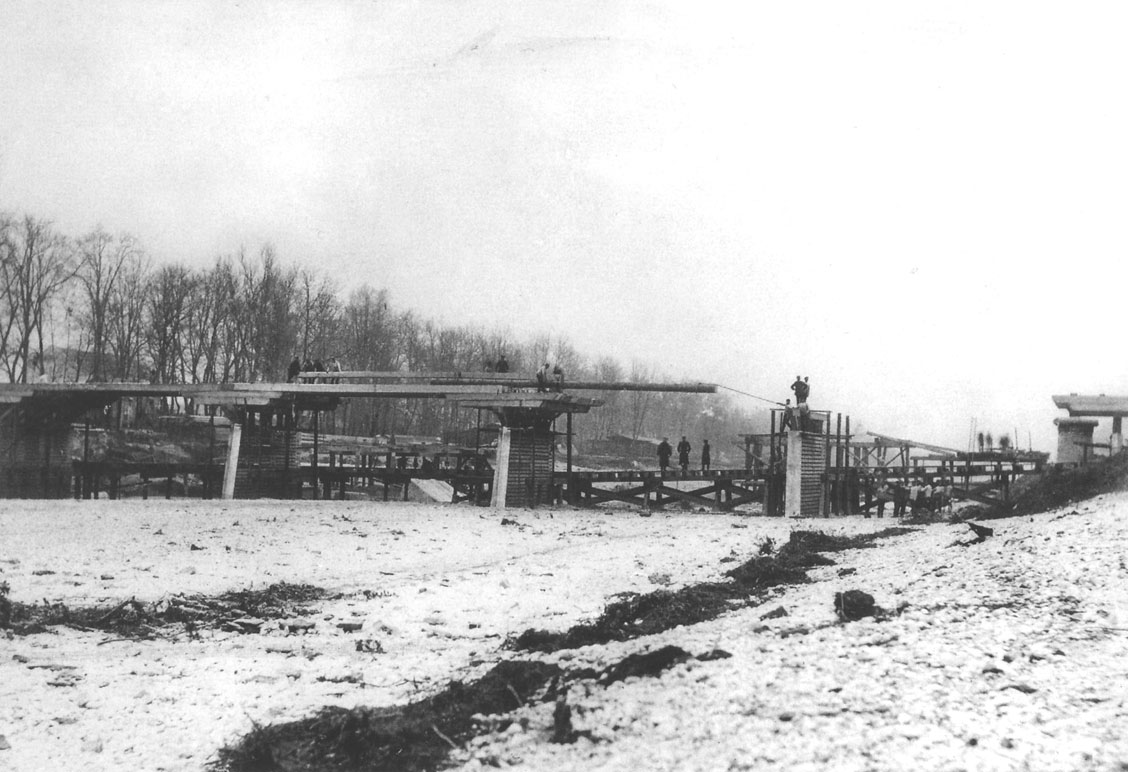 Bau der Notbrücke bei Bogenhausen